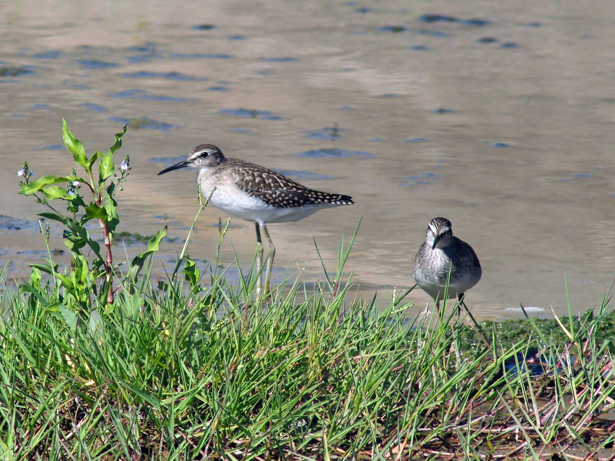 Deux chevaliers sylvains Tringa glareola